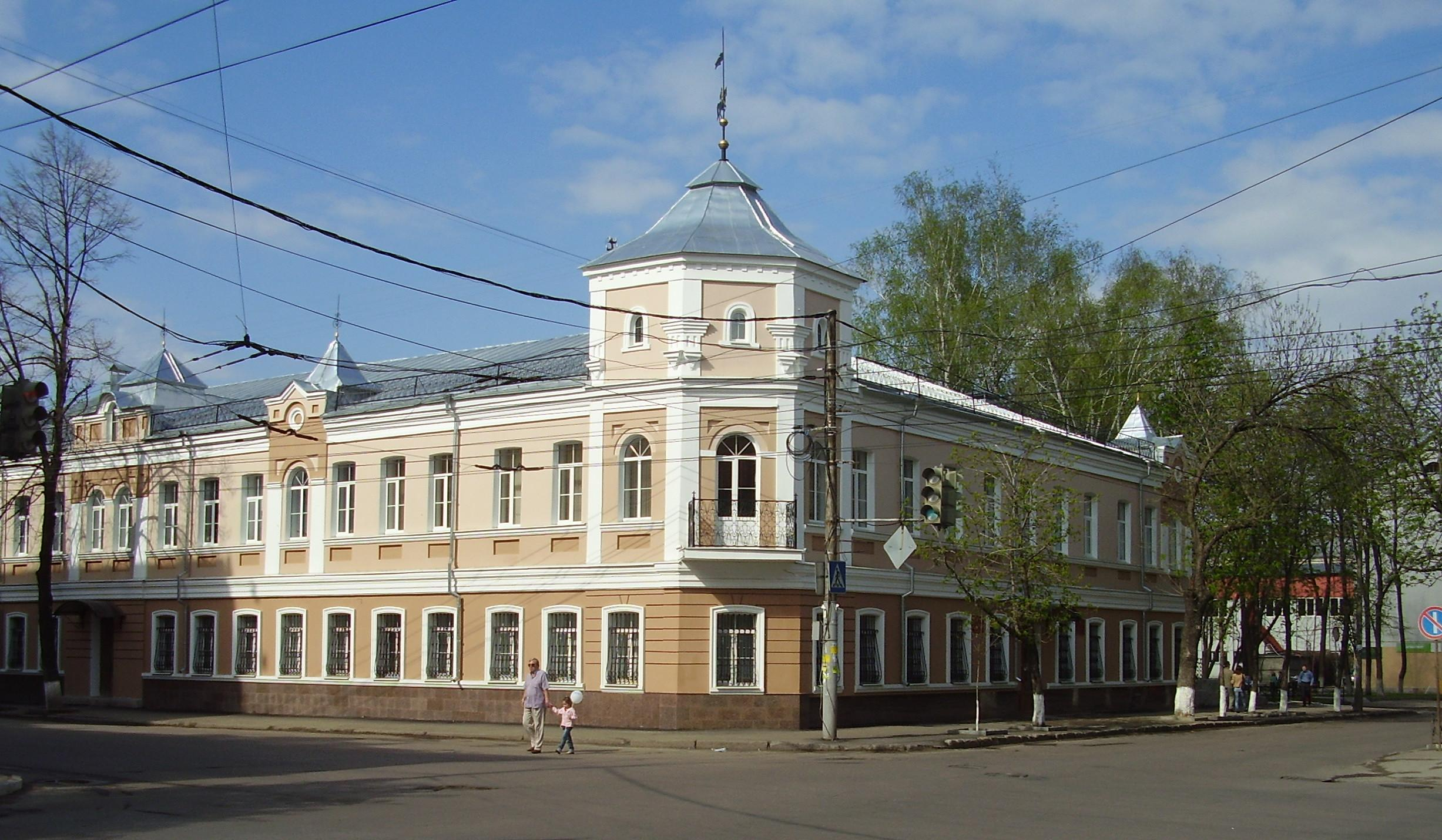 Воронеж. Старинный дом на пересечении улиц Ф.Энгельса и Среднемосковской